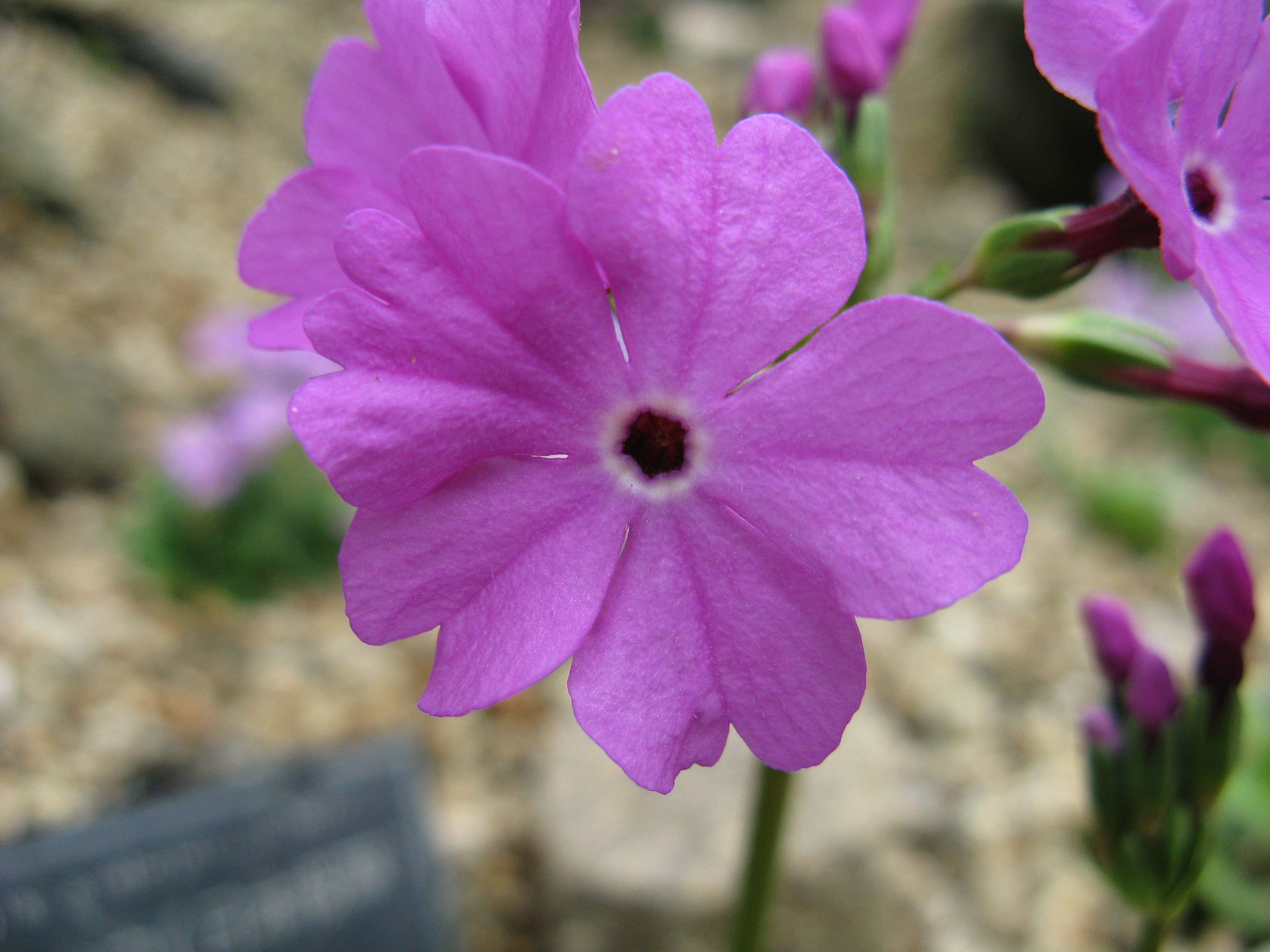 Primula sieboldii